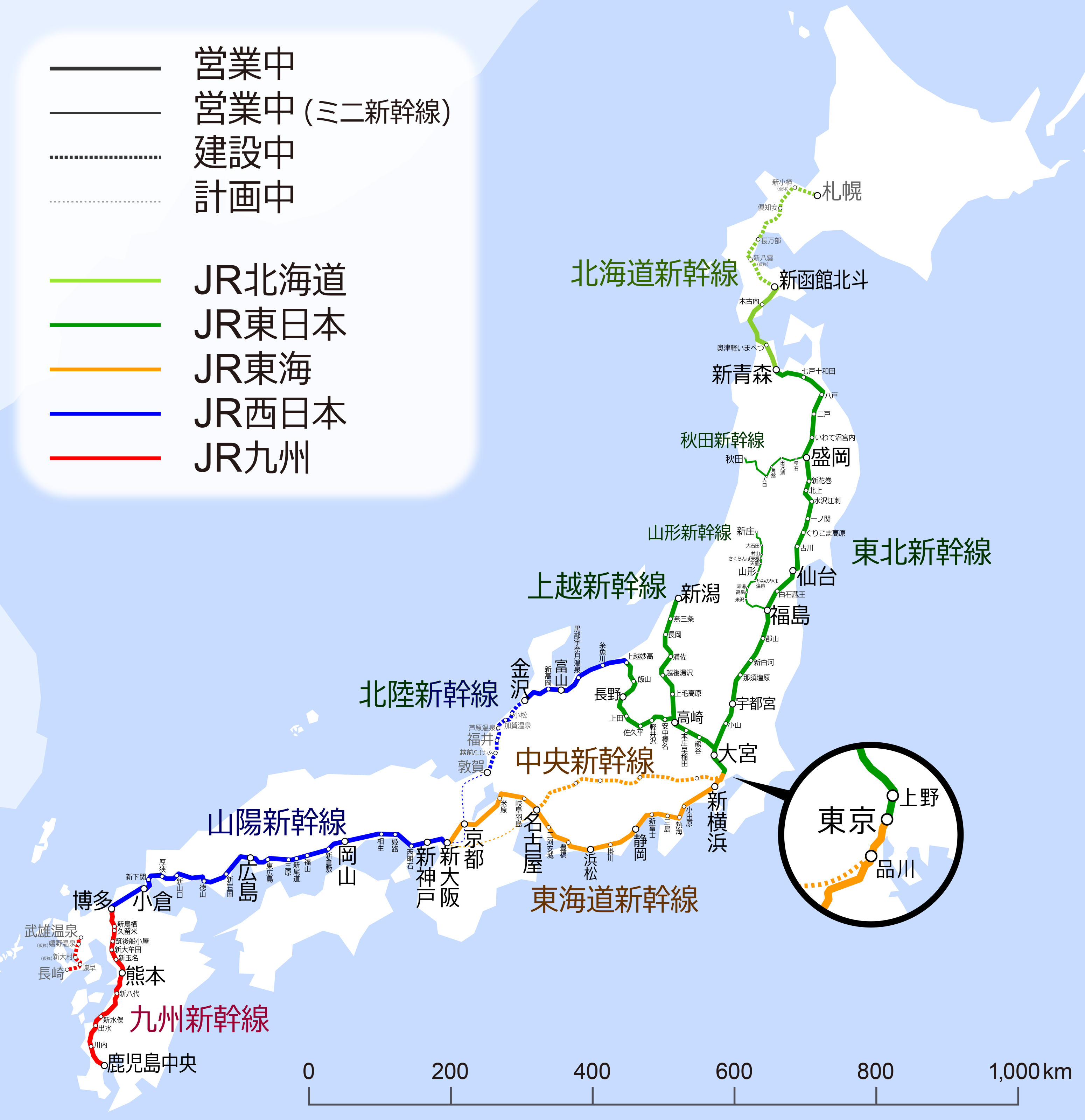 新幹線の路線図(2017年3月～)。ミニ新幹線や建設中・計画中の整備新幹線および中央新幹線を含む。